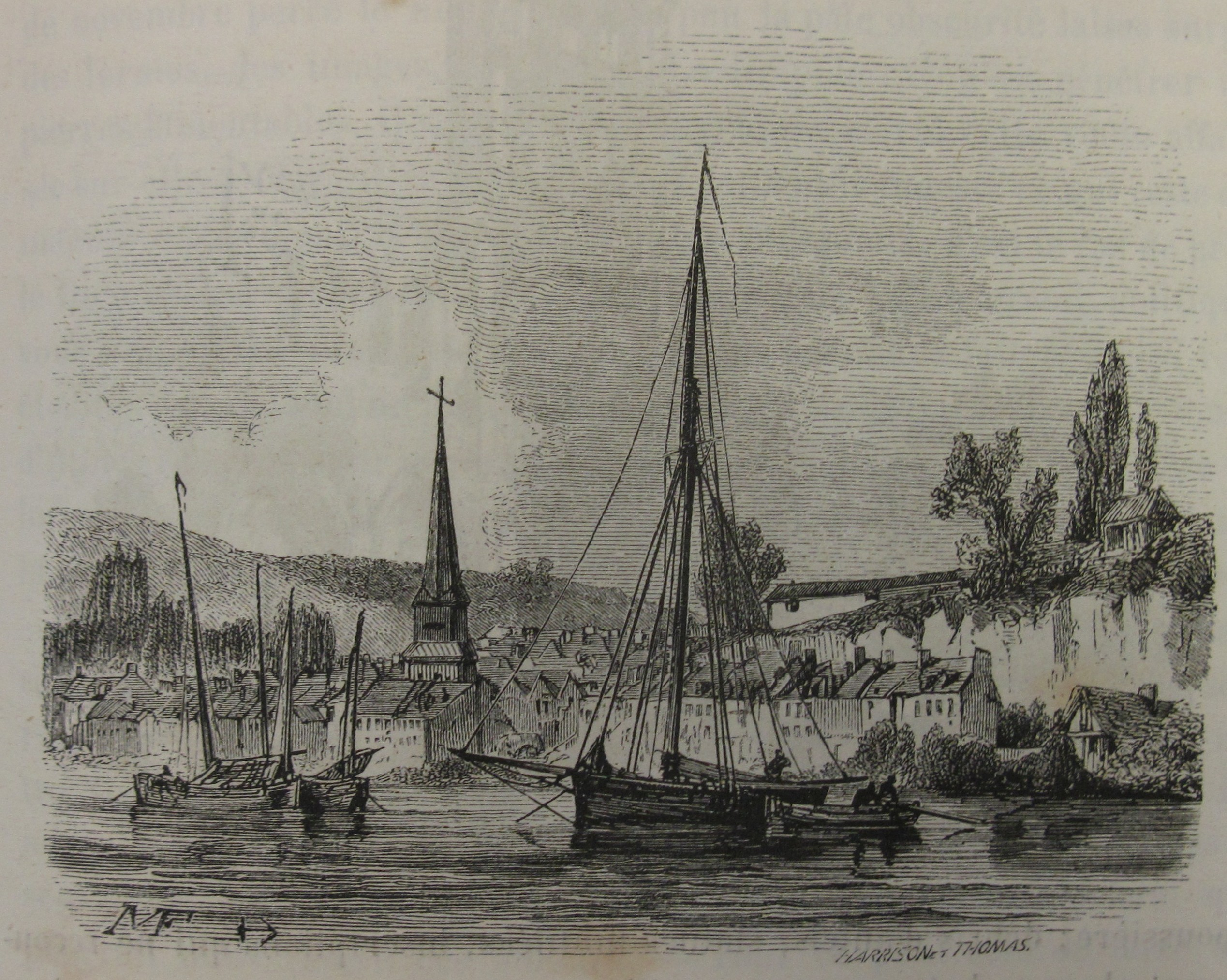 La Normandie par M. Jules Janin, illustrée par MM Morel-Fatio, Tellier, Gigoux, Daubigny, Debon, H. Bellangé, Alfred Johannot. Paris, Ernest Bourdin, éditeur, Rue de Seine, 51.] This is a faithful photographic reproduction of a two-dimensional, public domain work of art. The work of art itself is in the public domain for the following reason: This work is in the public domain in its country of origin and other countries and areas where the copyright term is the author's life plus 100 years or less. This work is in the public domain in the United States because it was published (or registered with the U.S. Copyright Office) before January 1, 1924. This file has been identified as being free of known restrictions under copyright law, including all related and neighboring rights. The official position taken by the Wikimedia Foundation is that "faithful reproductions of two-dimensional public domain works of art are public domain".This photographic reproduction is therefore also considered to be in the public domain in the United States. In other jurisdictions, re-use of this content may be restricted; see Reuse of PD-Art photographs for details.